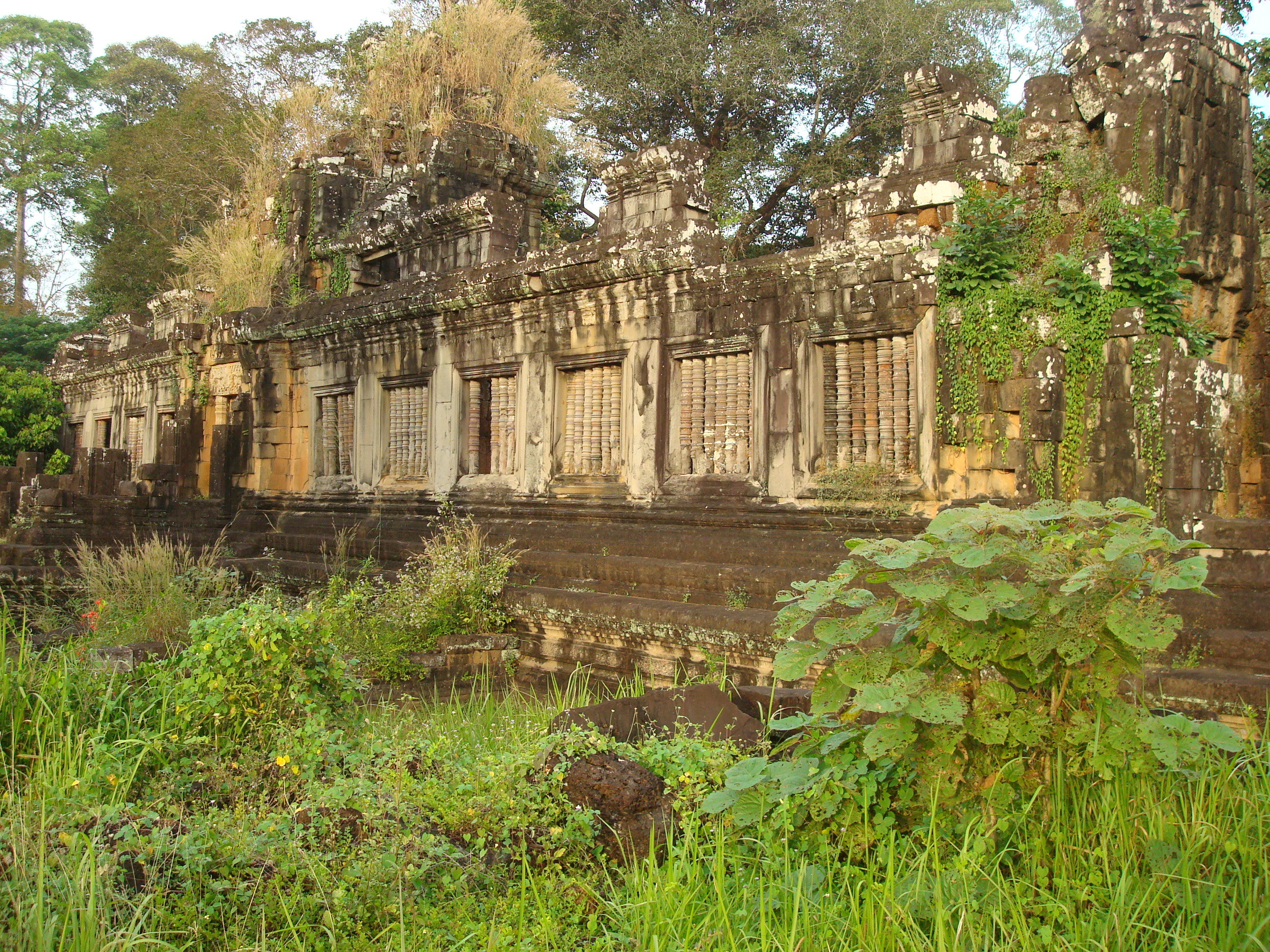 Nördlicher Khleang mit westlichem Vestibül